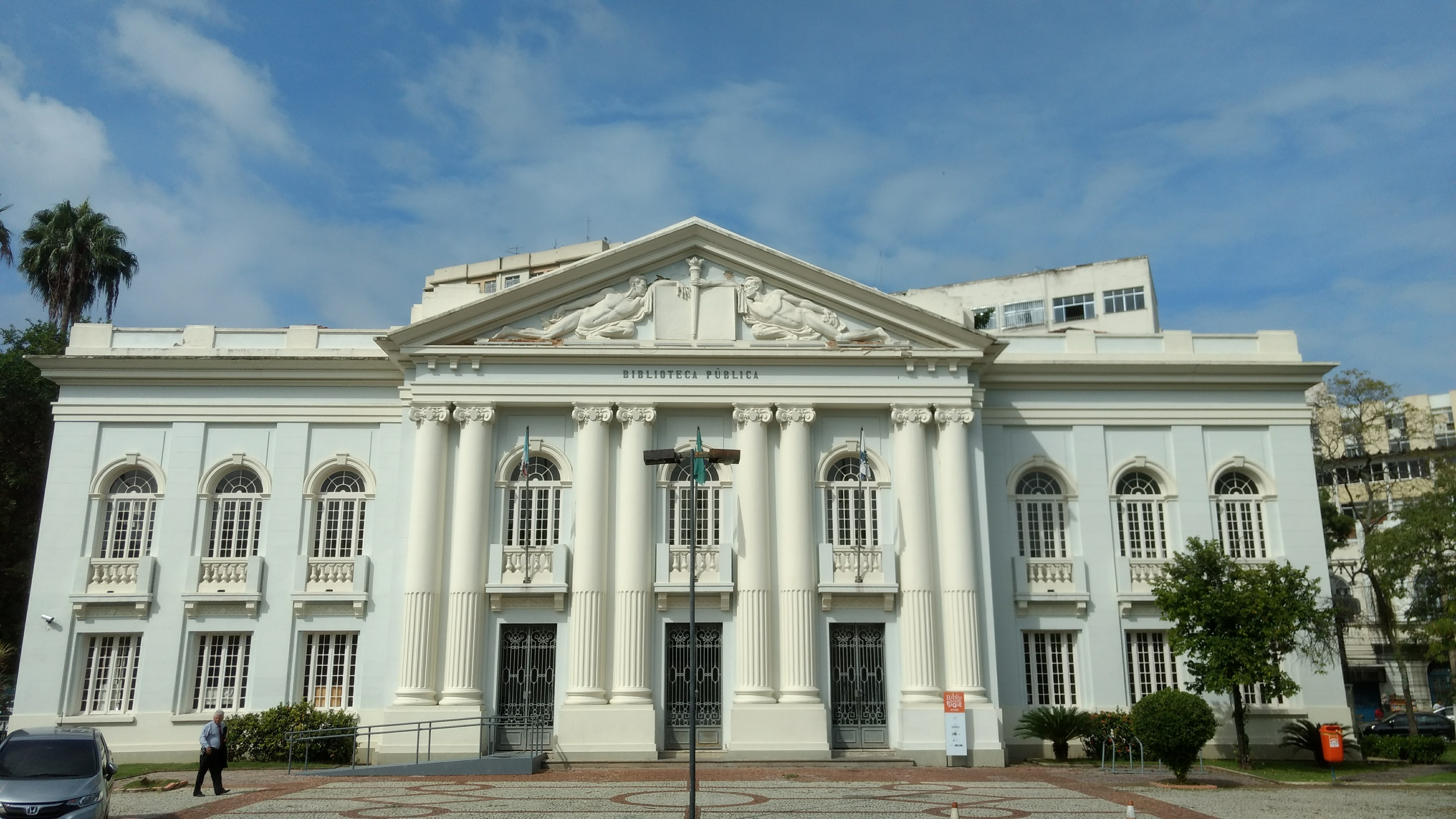 Frente da Biblioteca